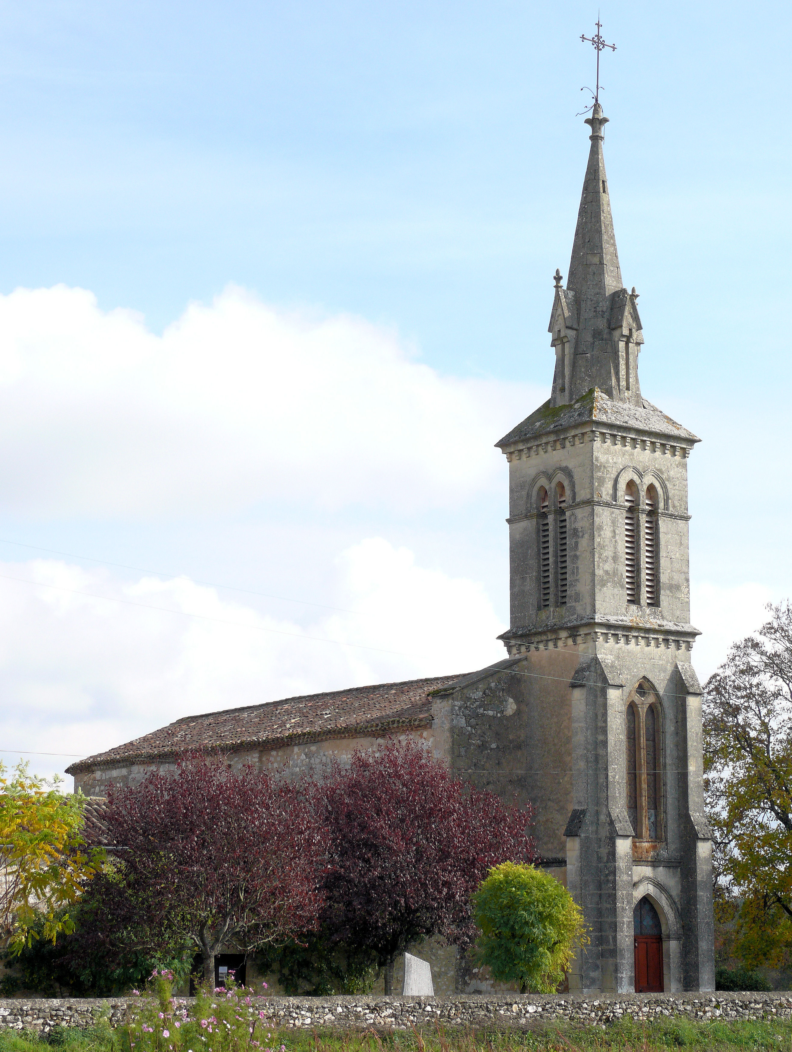 Lavalade - Eglise